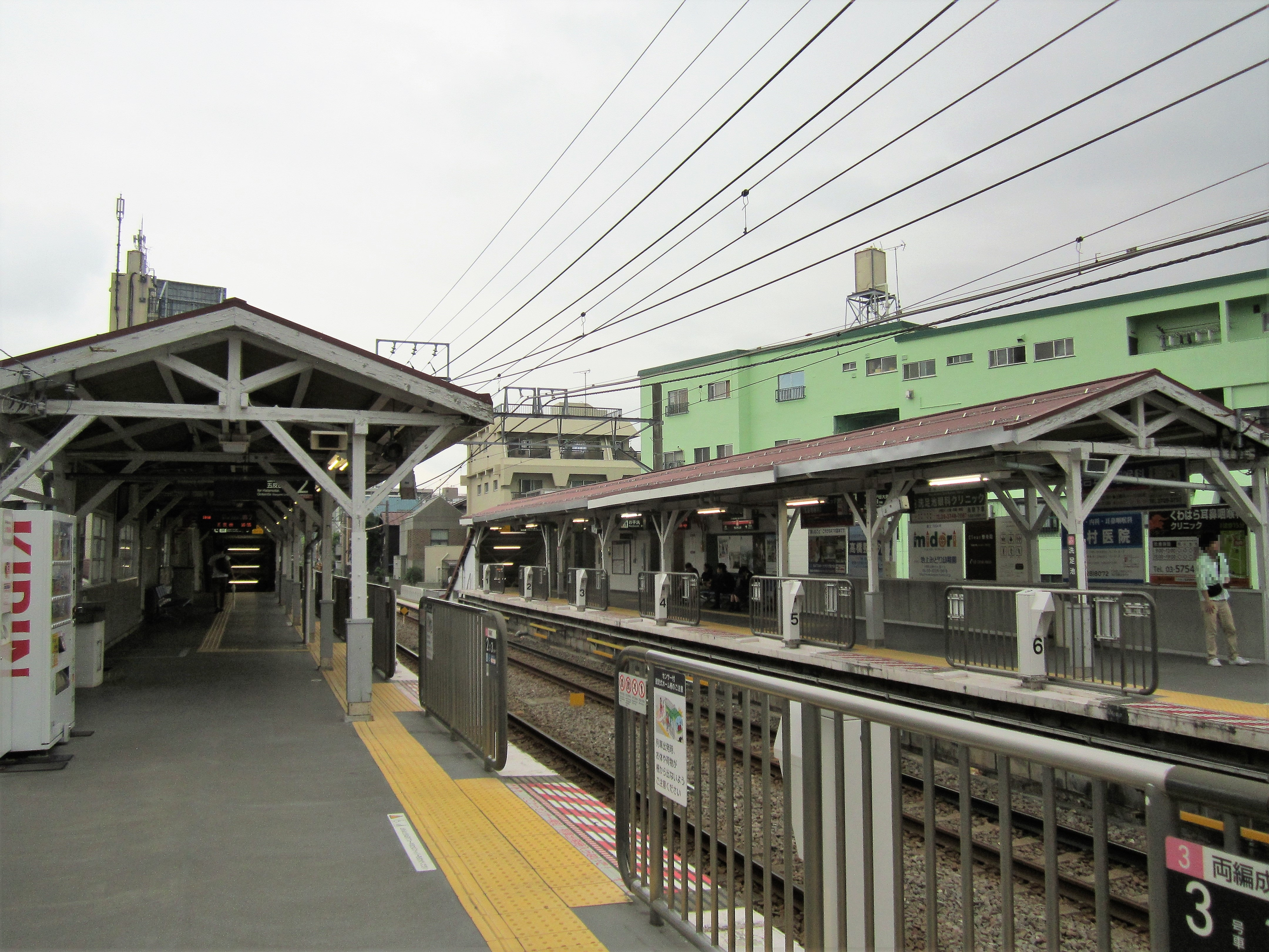 洗足池駅ホーム